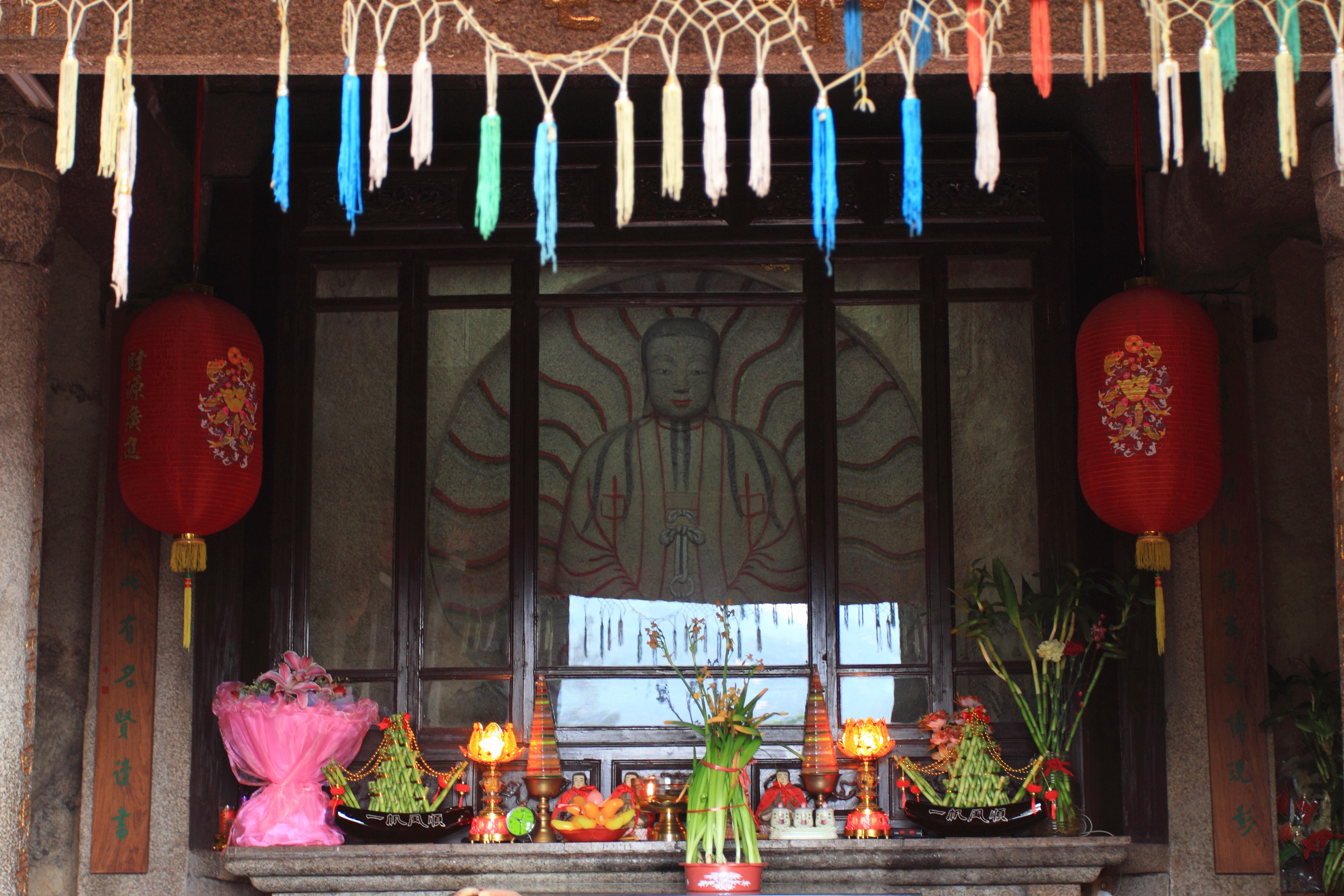 草庵，位于中国福建省晋江市，是全国重点文物保护单位。